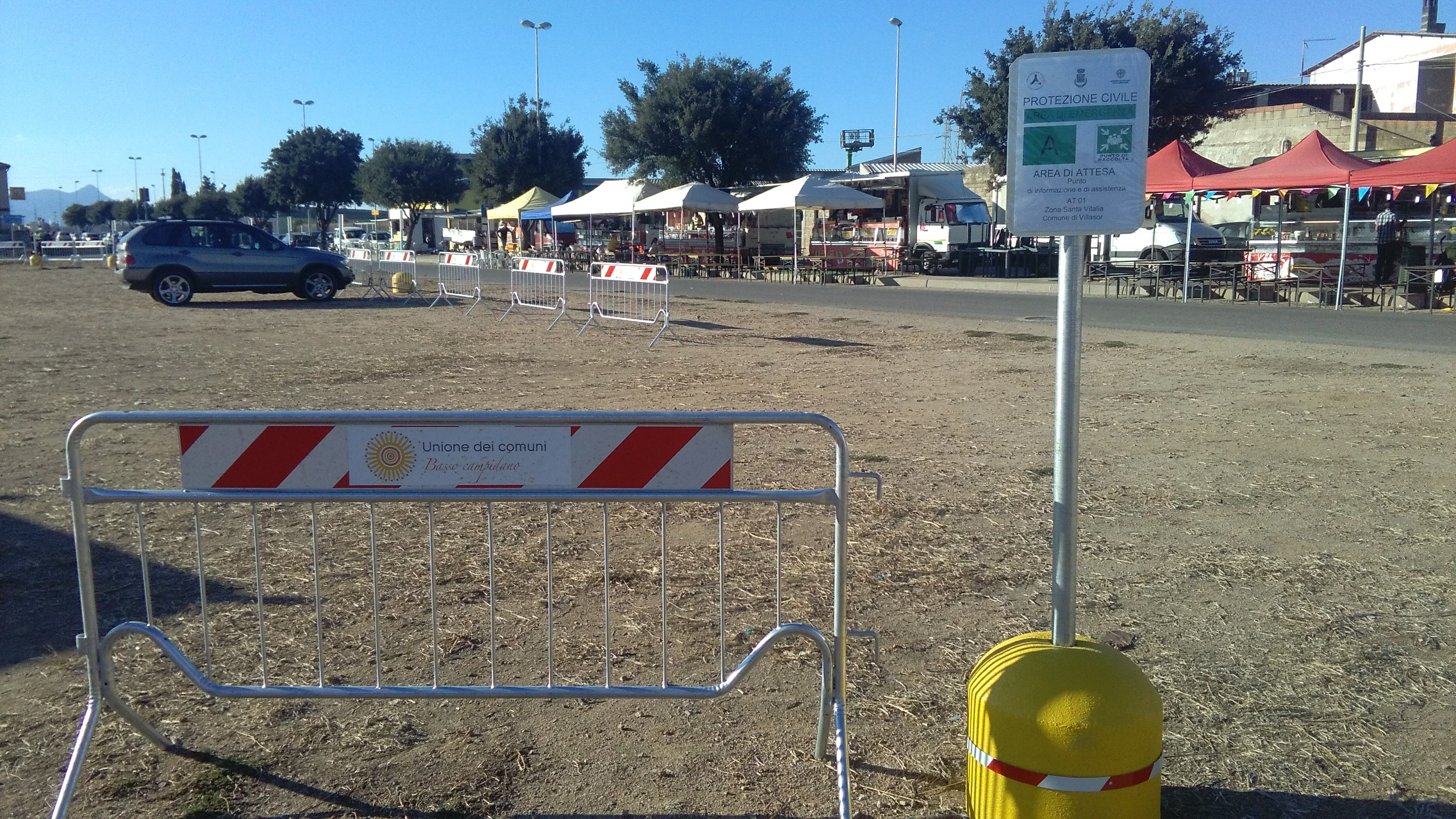 Una transenna recante il logo dell'Unione dei comuni del Basso Campidano, immortalata durante la Festa di Santa Vitalia 2017 a Villasor.